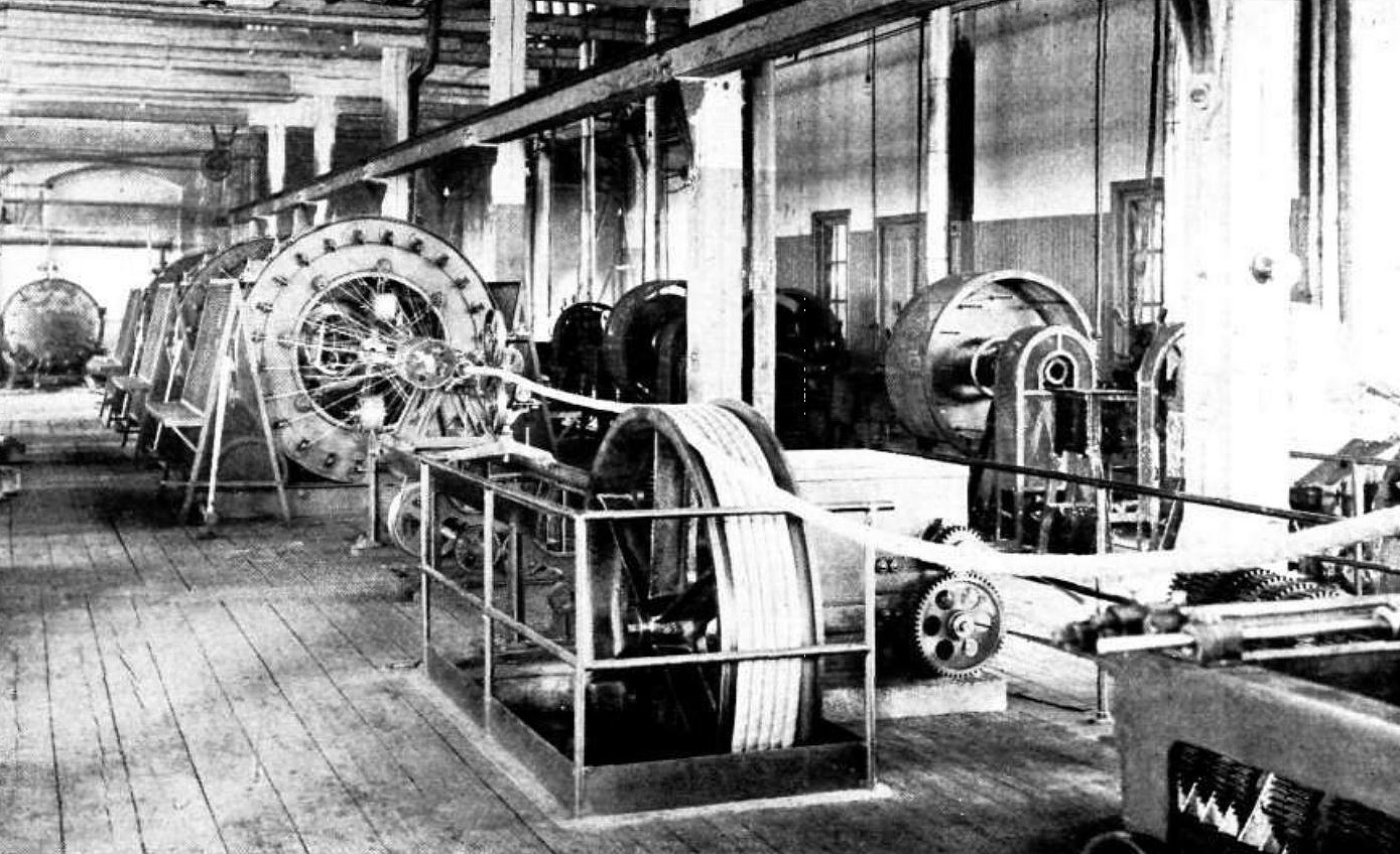 Nya kabelverket.